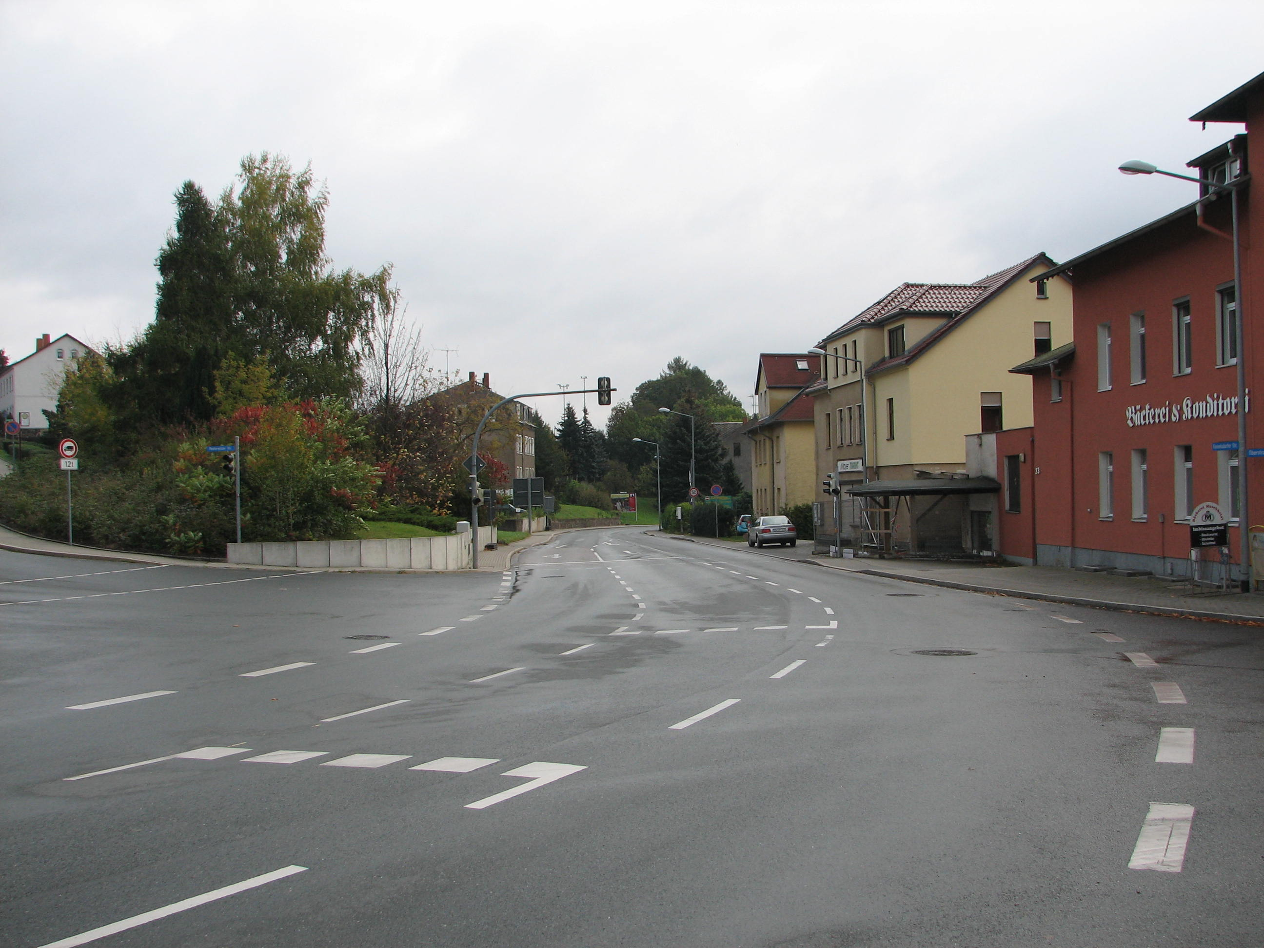 Straße "Kesselsdorfer Straße" in Freital-Wurgwitz